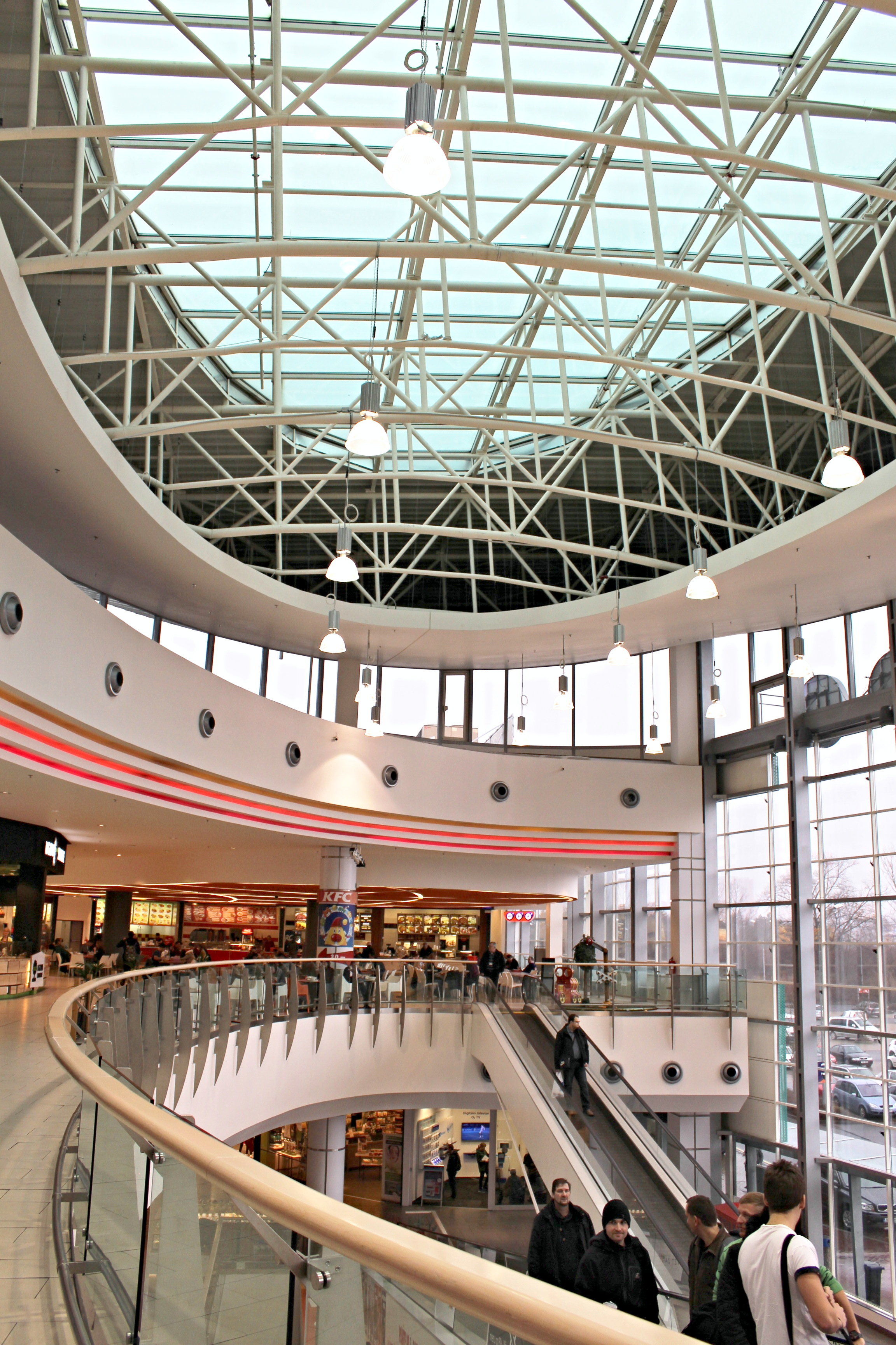 Nákupní centrum Galerie Nové Butovice